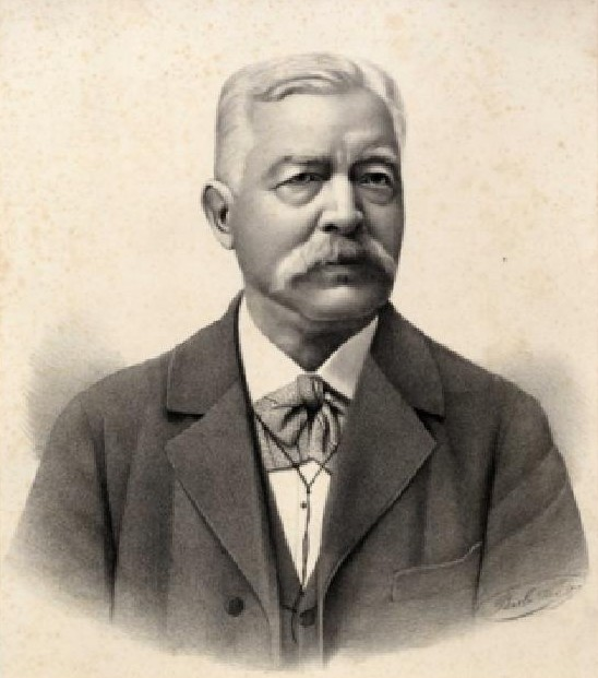 Heinrich Preisenhammer (1830-1900), rakouský právník a politik německé národnosti z Moravy